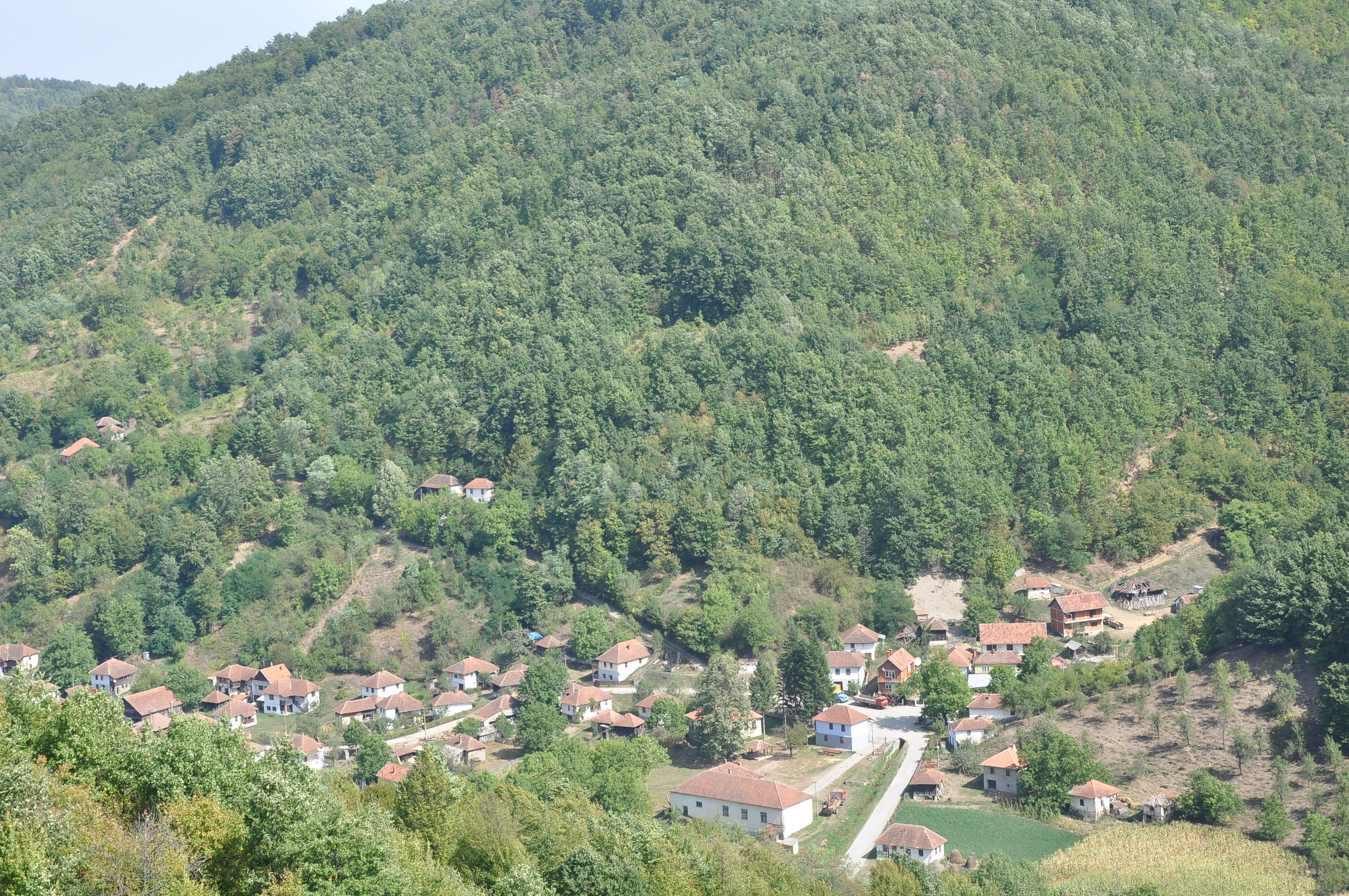 Центар села